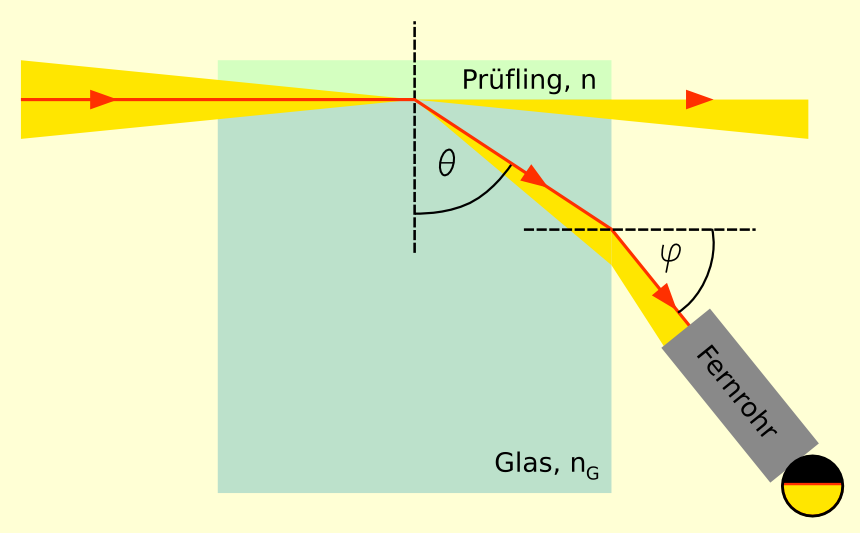 Pulfrich Refraktometer, Deutsche Version